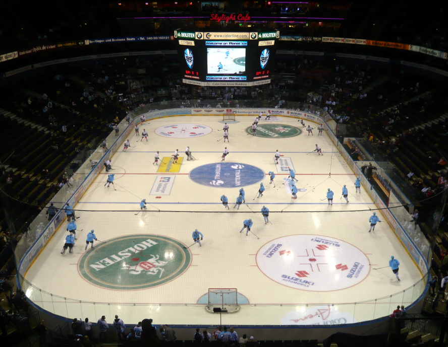 Hamburg Freezers vs. Eisbären Berlin - both teams warming up. Warmlaufen beim Spiel der Hamburg Freezers vs. Eisbären Berlin am 17.02.2008